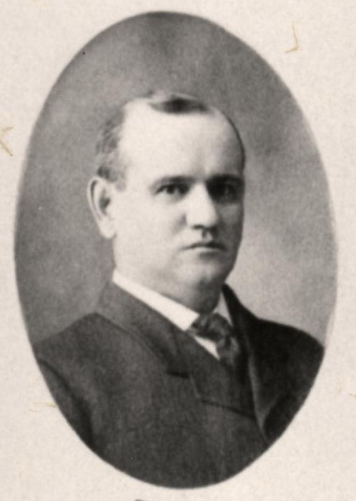 Sen G.H. Baker